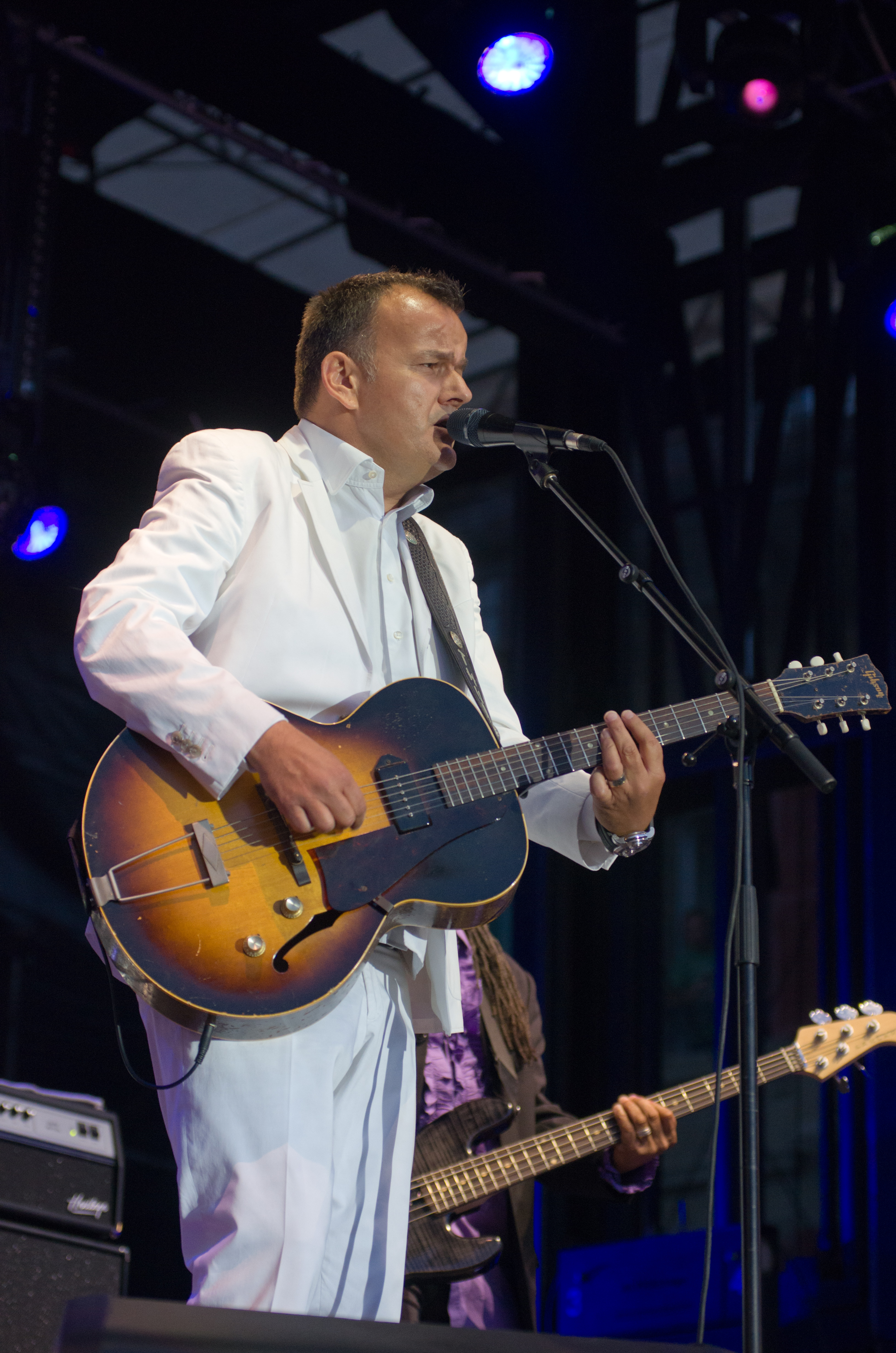 Philipp Fankhauser am Stars Of Sounds 2012 in Aarberg.